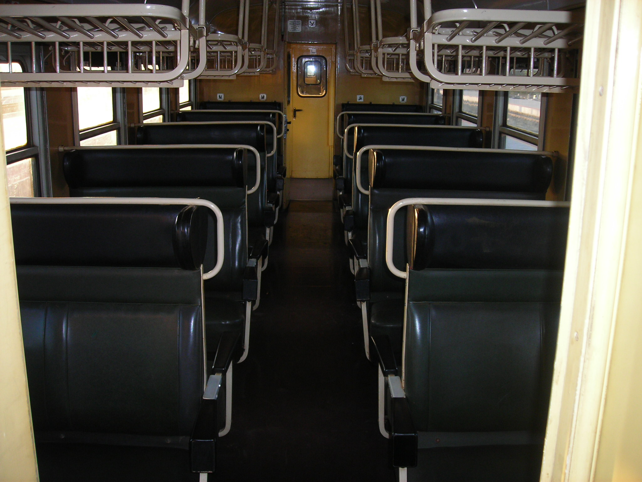 Bhv kocsi belseje (Cegléd)